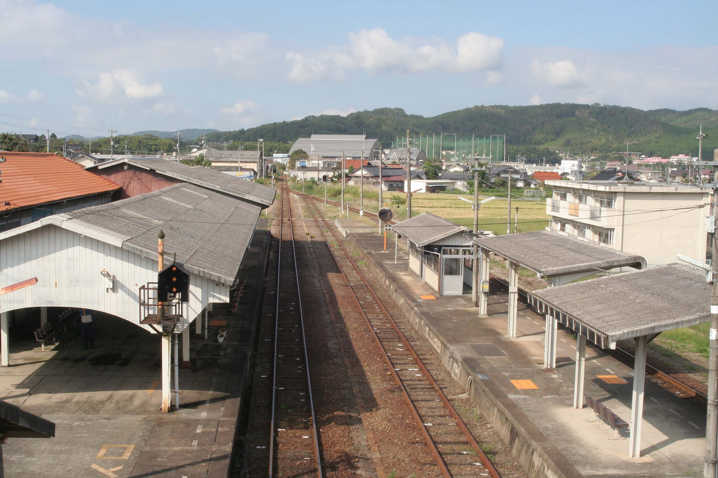 西日本旅客鉄道 備後庄原駅の構内